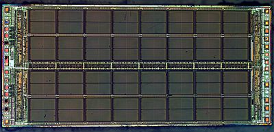 фотографија од Micron Technology ДРАМ